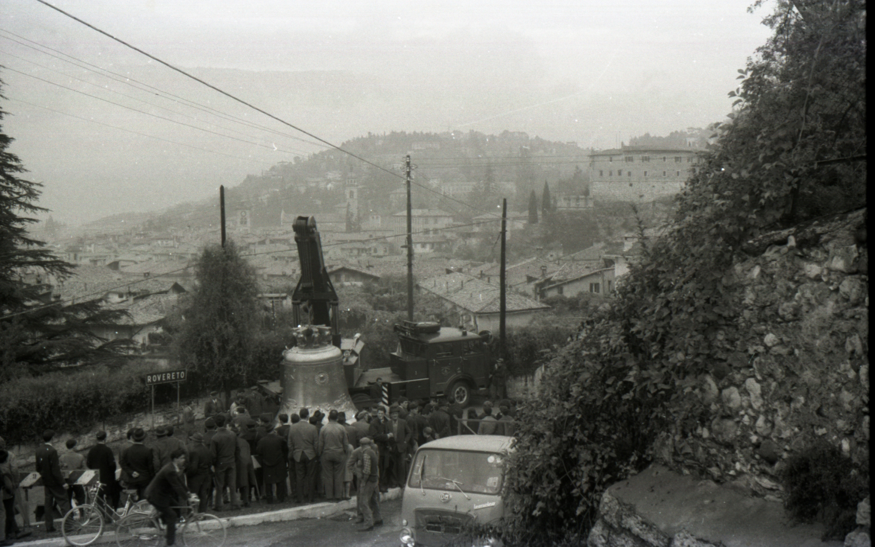 trasporto della Campana dei Caduti (viale Schio Rovereto)